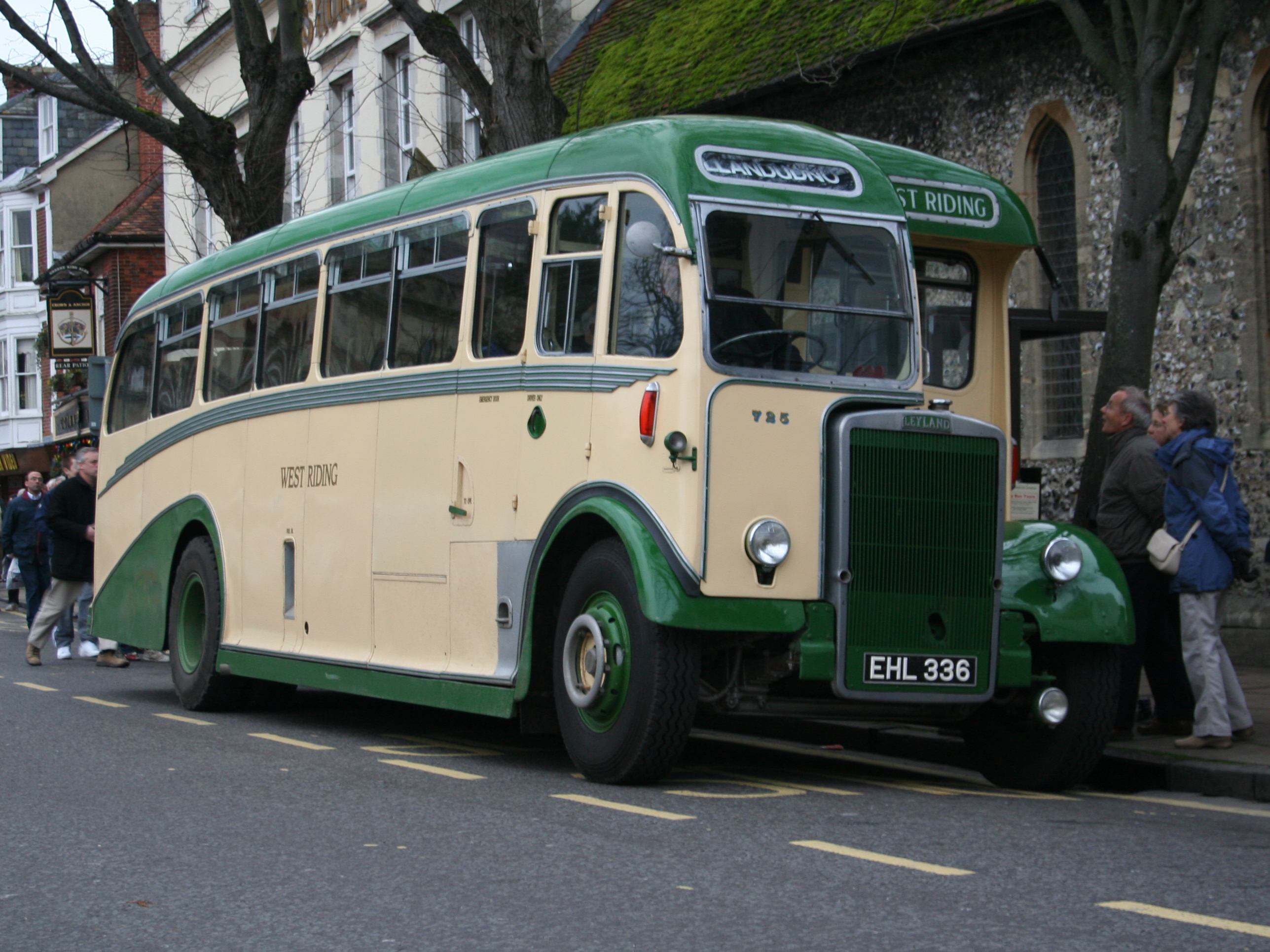 1952 West Riding Roe-bodied Leyland Tiger PS2